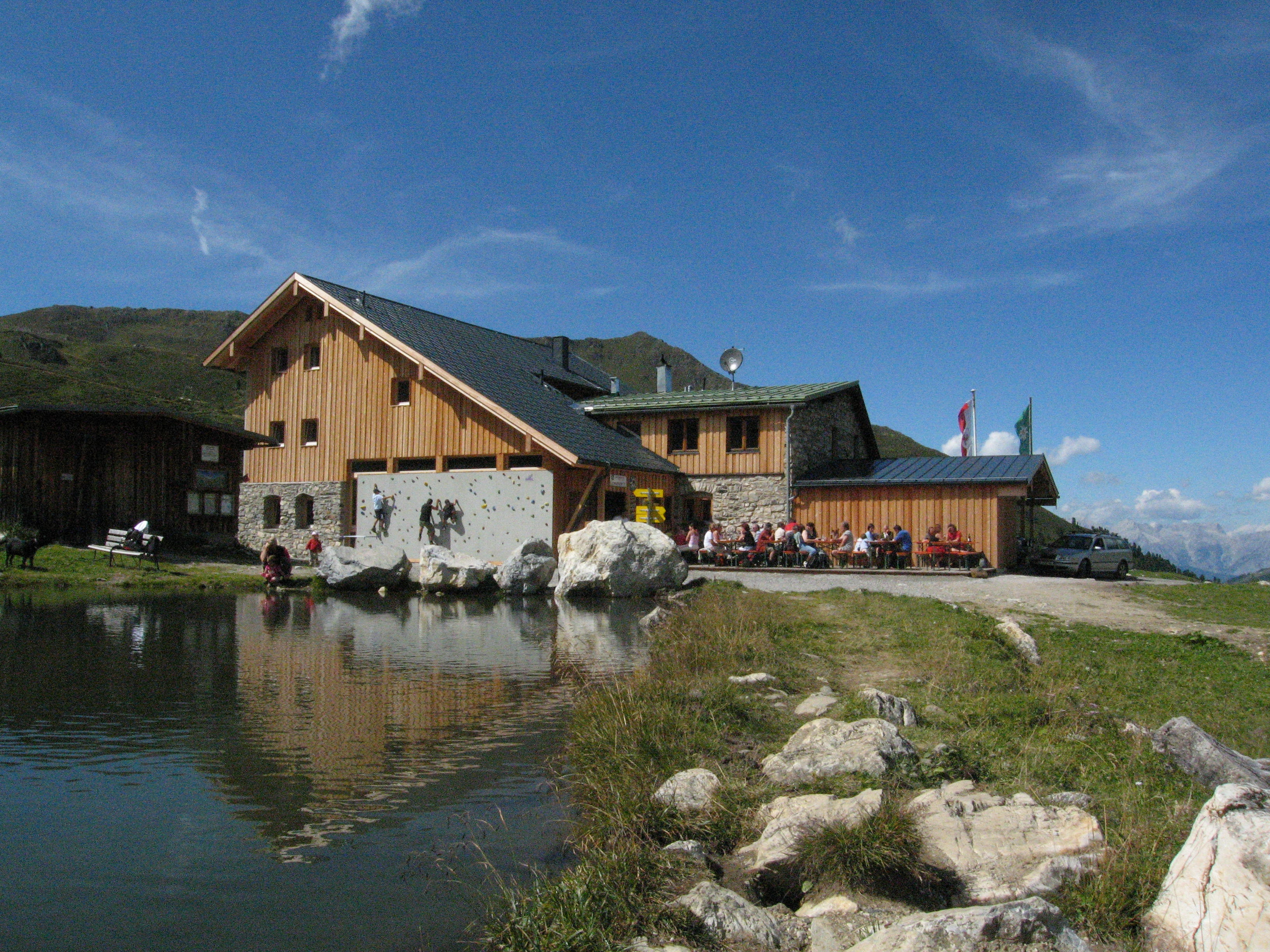 Lizumerhütte